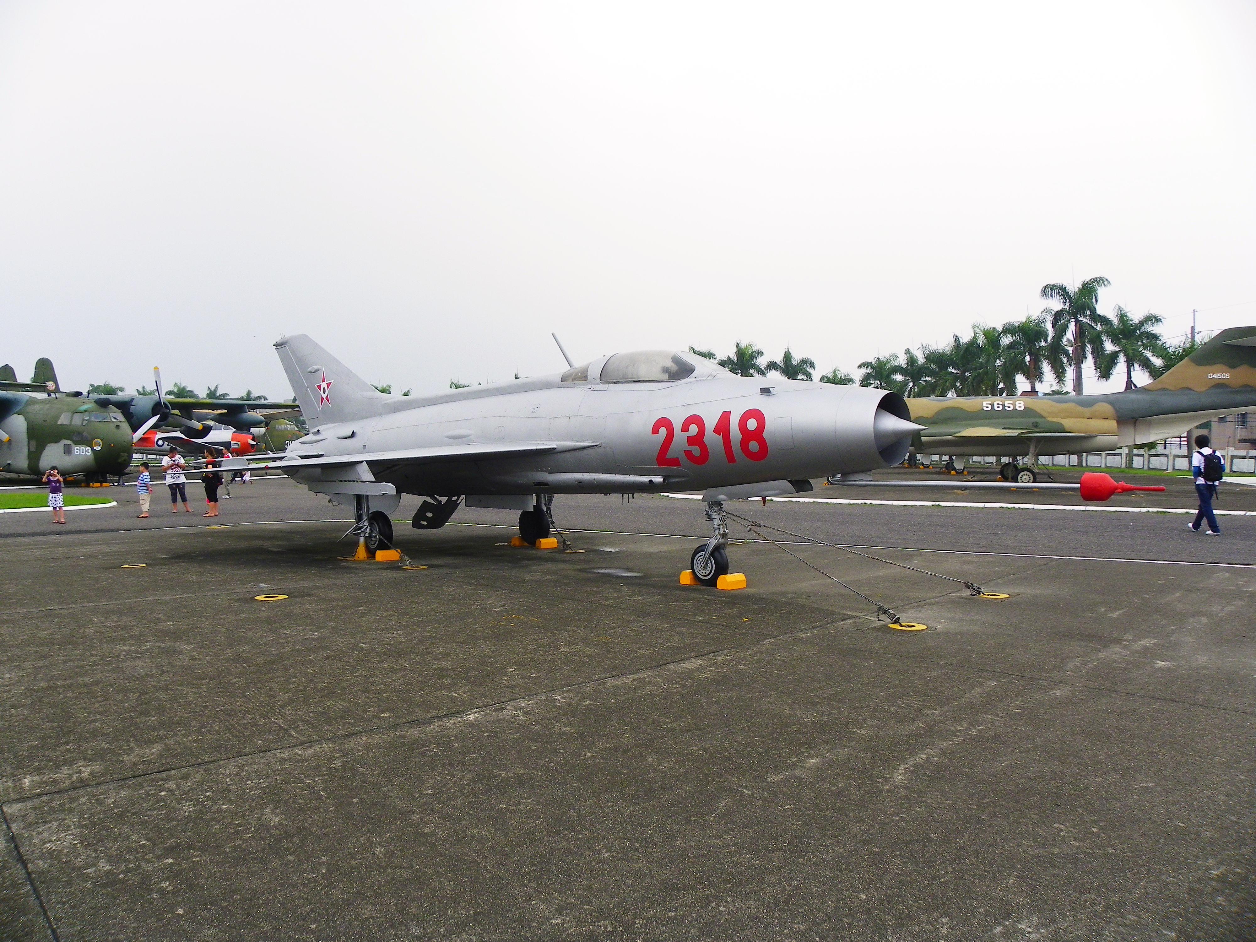 1990年2月18日，基隆海關在東三碼頭驗關中，自可疑貨櫃發現一架匈牙利籍MiG-21戰鬥機，隨即以申報不實查扣充公；經組裝調查後，現存岡山空軍官校軍機展示場。